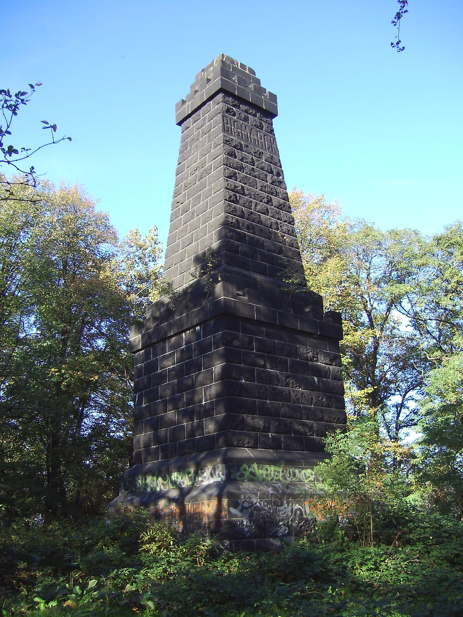 Bismarckturm Essen-Kray, Am Mechtenberg